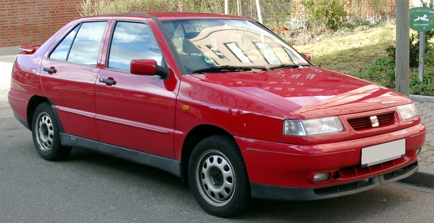 Seat Toledo, 1. Generation